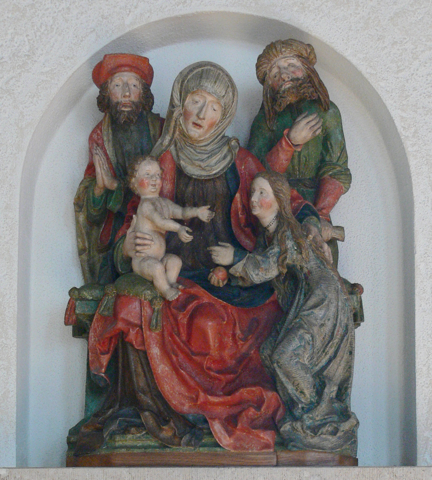 Tomerdingen, Gemeinde Dornstadt, Alb-Donau-Kreis Katholische Pfarrkirche Mariä Himmelfahrt Heilige Sippe, Ulmer Schule, um 1515